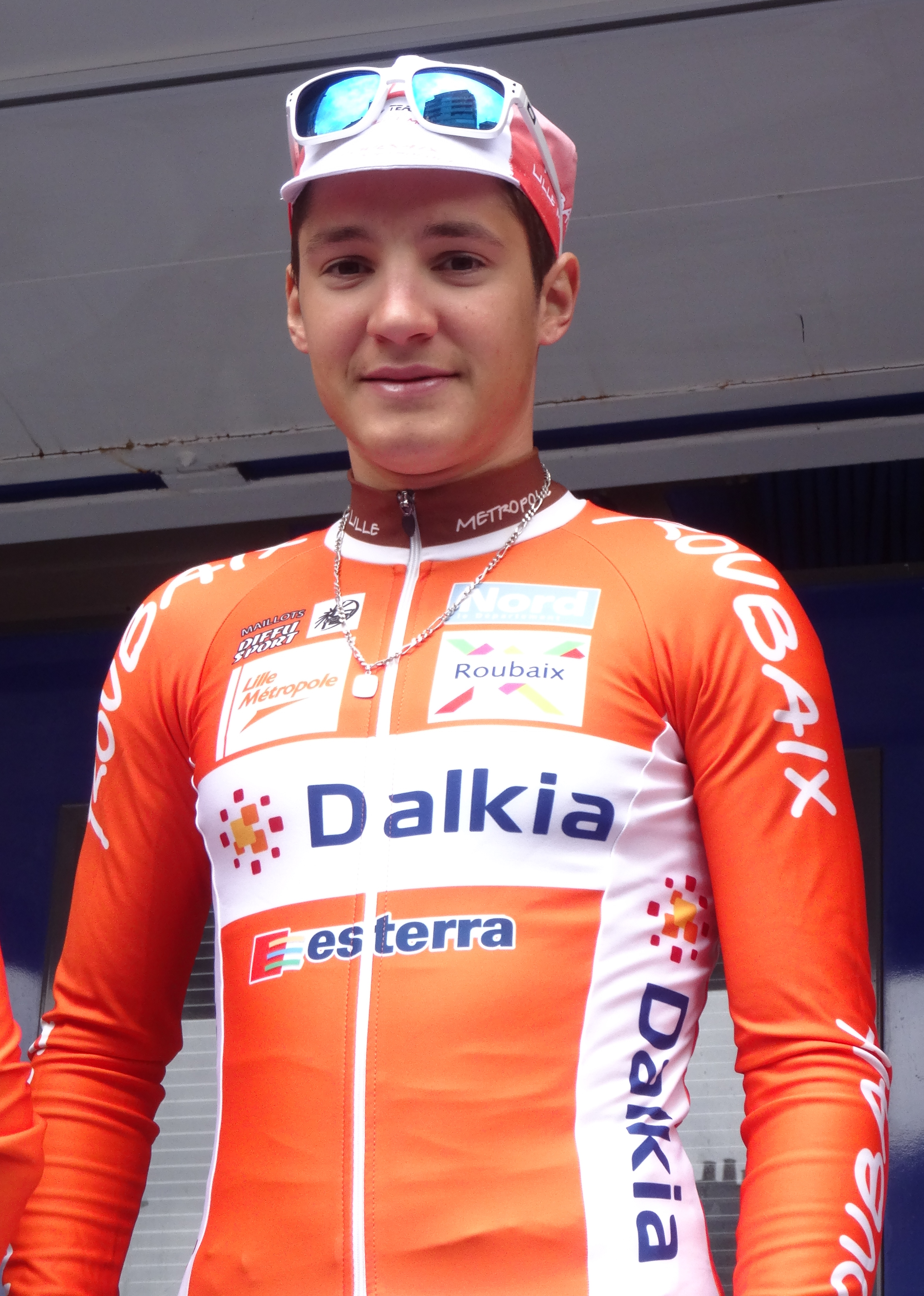 Reportage photographique réalisé le mercredi 7 mai 2014 au départ de la première étape de l'édition 2014 des Quatre jours de Dunkerque à Dunkerque, Nord, Nord-Pas-de-Calais, France. Depicted person: Jimmy Turgis Depicted team: Roubaix Lille Métropole